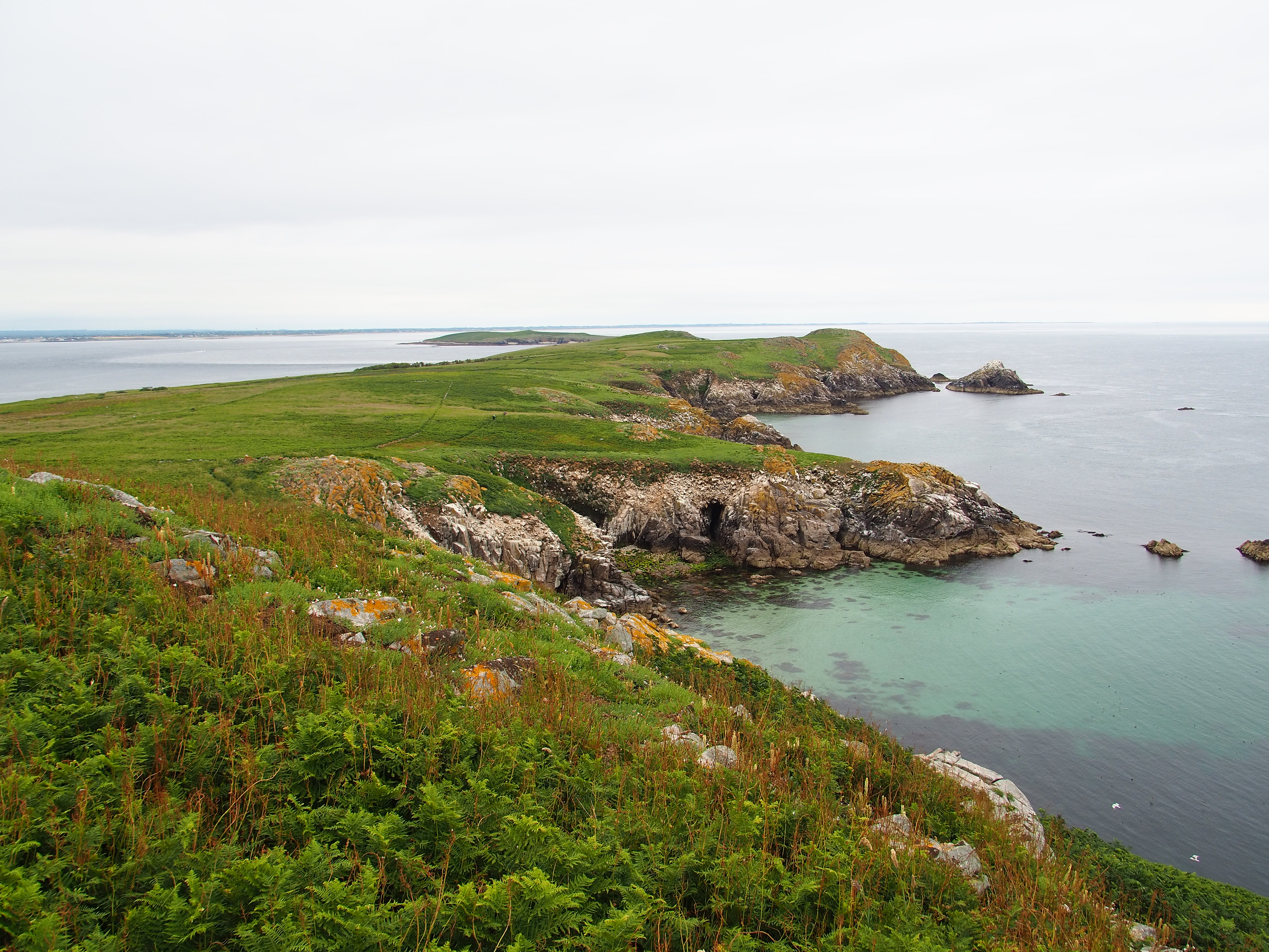 Great Saltee Island cervenec 2019